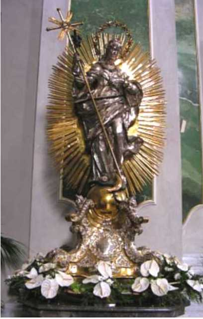 Immaculata Jesuitenkirche Mannheim